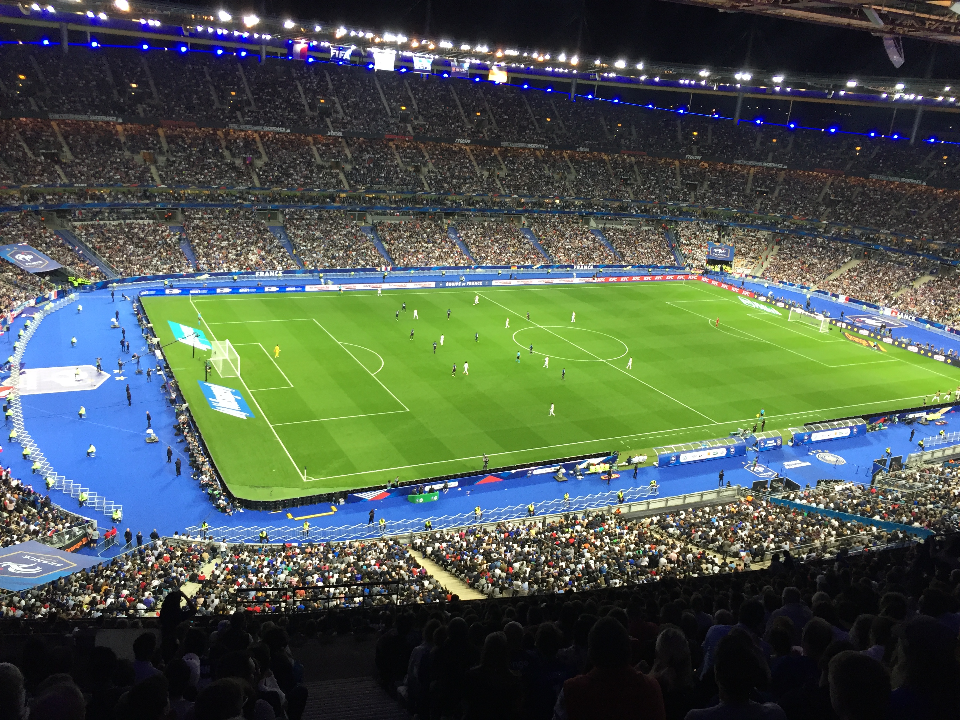 France-Allemagne en ligue des Nations au stade de France le 16 octobre 2018